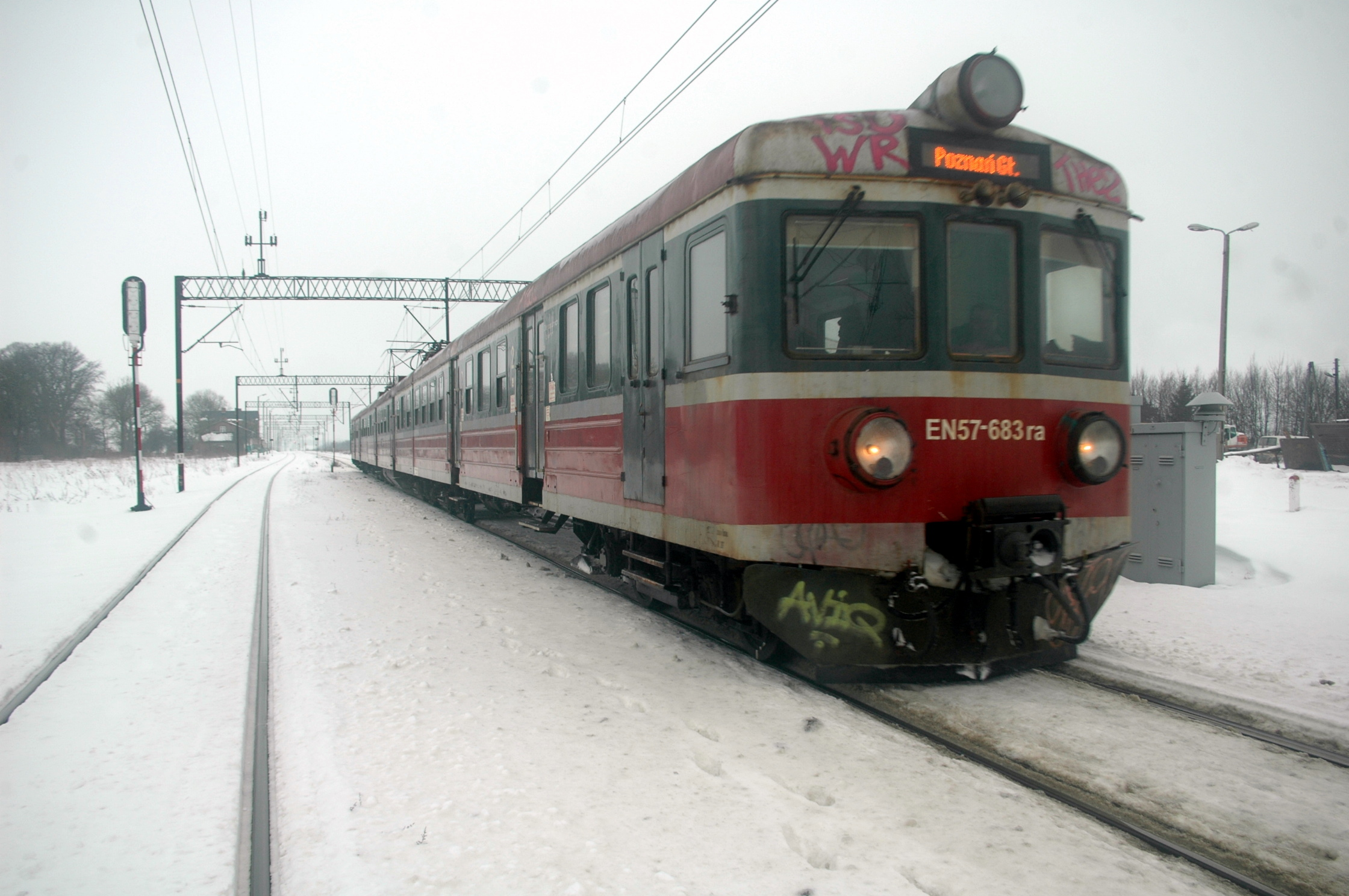 EN57-683ra na linii kolejowej linii kolejowej nr 404 w Dygowie.